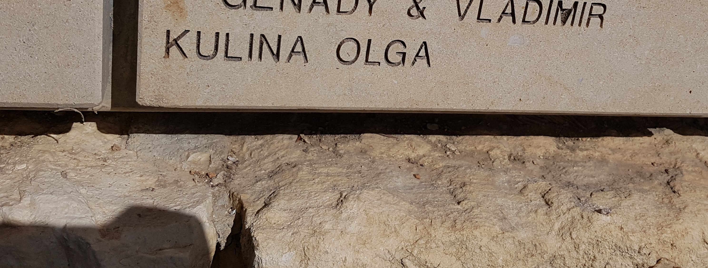 שמה של אולגה קולינה על קיר הזיכרון ביד ושם